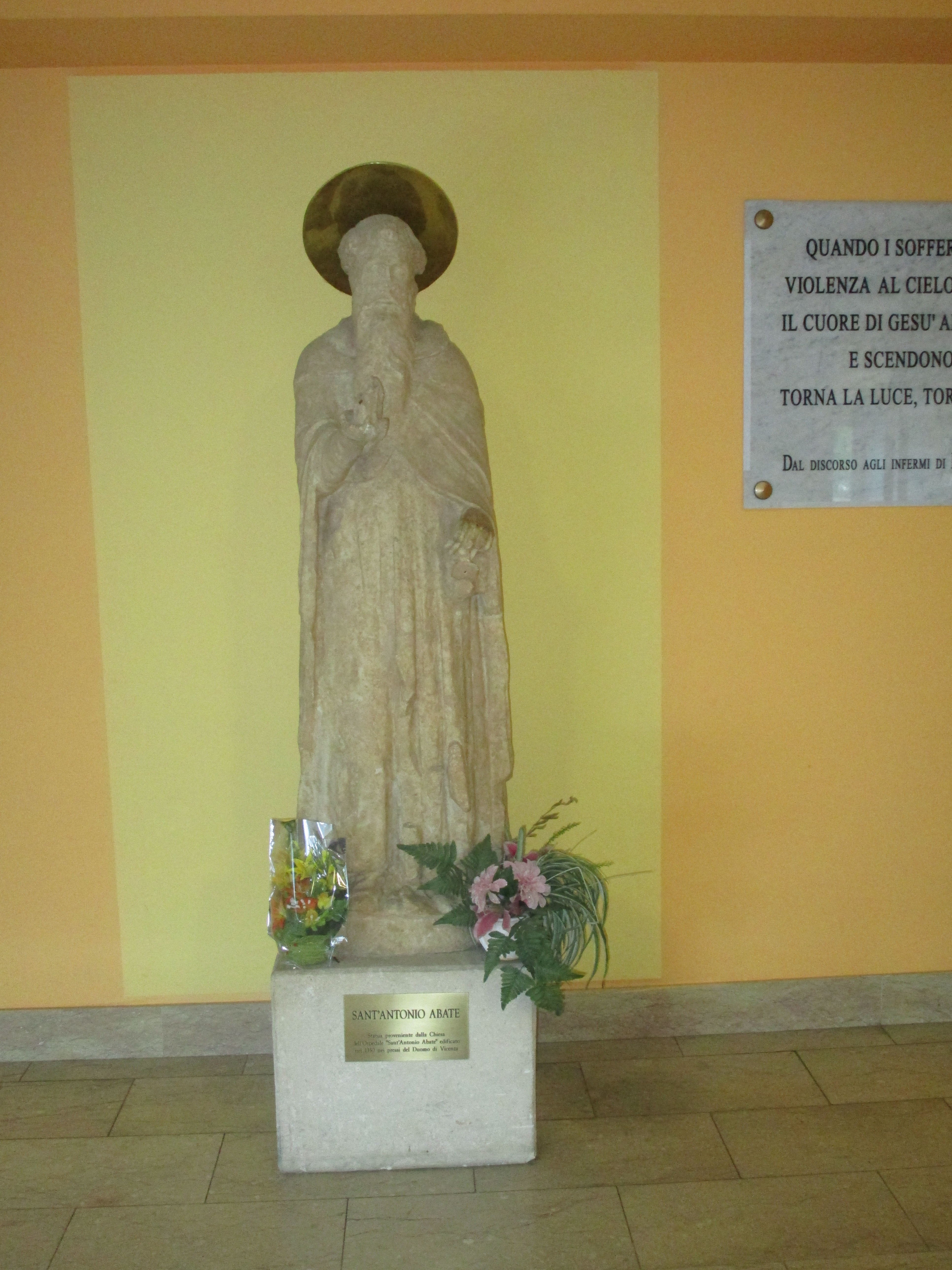 Interno dell'Ospedale San Bortolo (Vicenza), Sant'Antonio Abate proveniente dalla Chiesa dell'Ospedale Sant'Antonio Abate edificato nel 1350 nei pressi del Duomo di Vicenza.